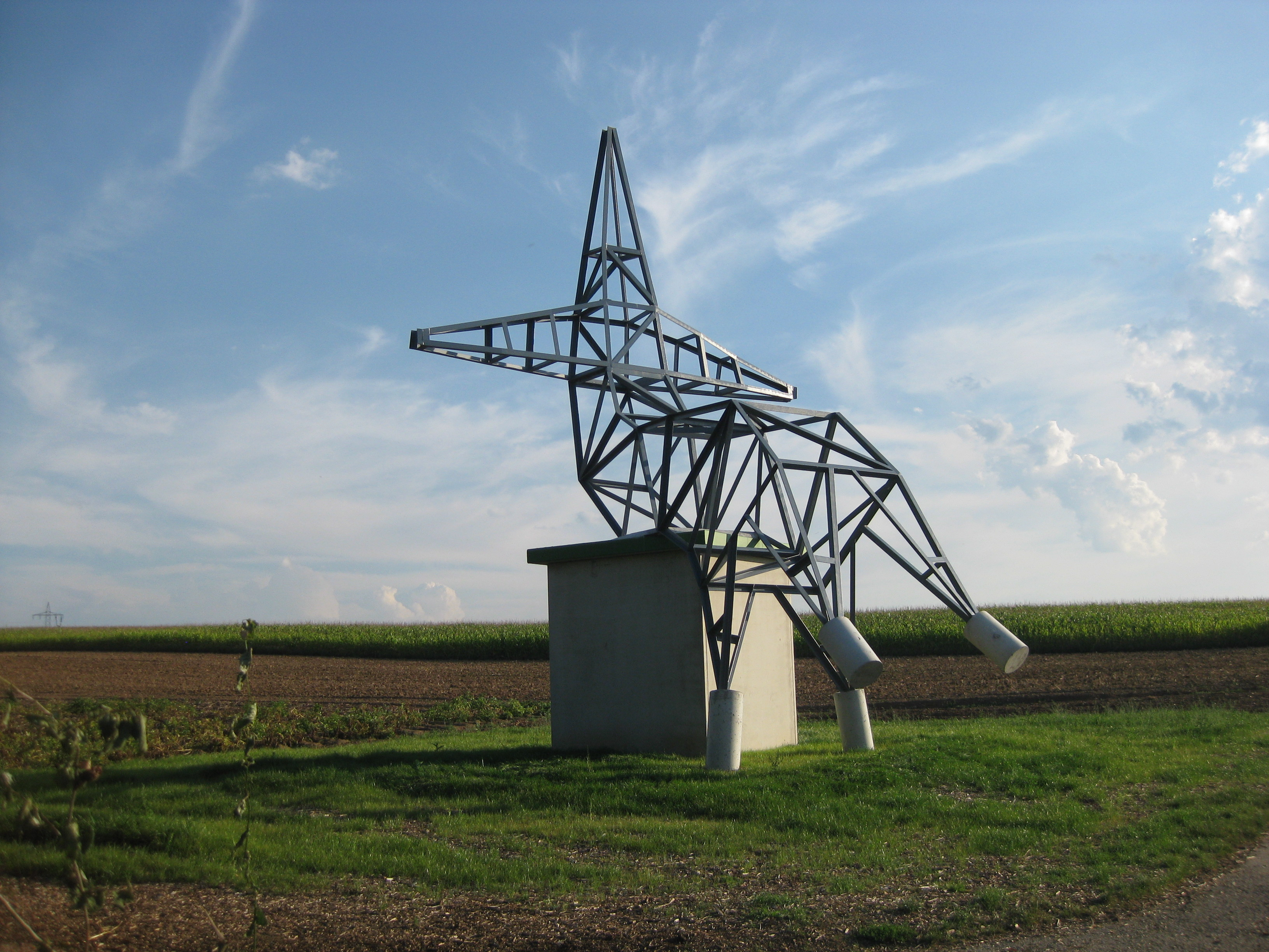 Werk: Freizeit-Muße der Künstlergruppe: Inges Idee Standort: Besinnungsweg in Fellbach